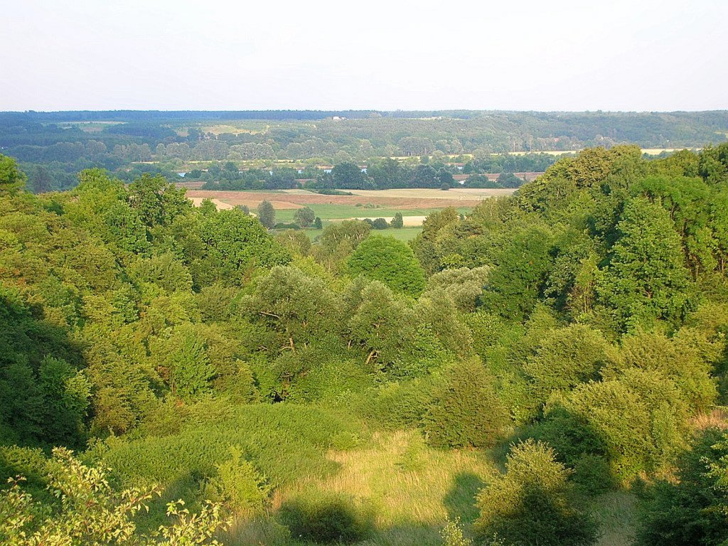 Widok z uroczyska "Prodnia" w Jarużynie pod Bydgoszczą na Dolinę Dolnej Wisły